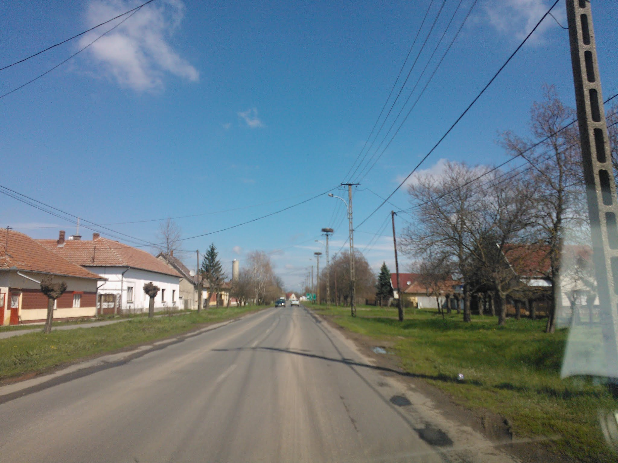 Vésztő, Kossuth utca